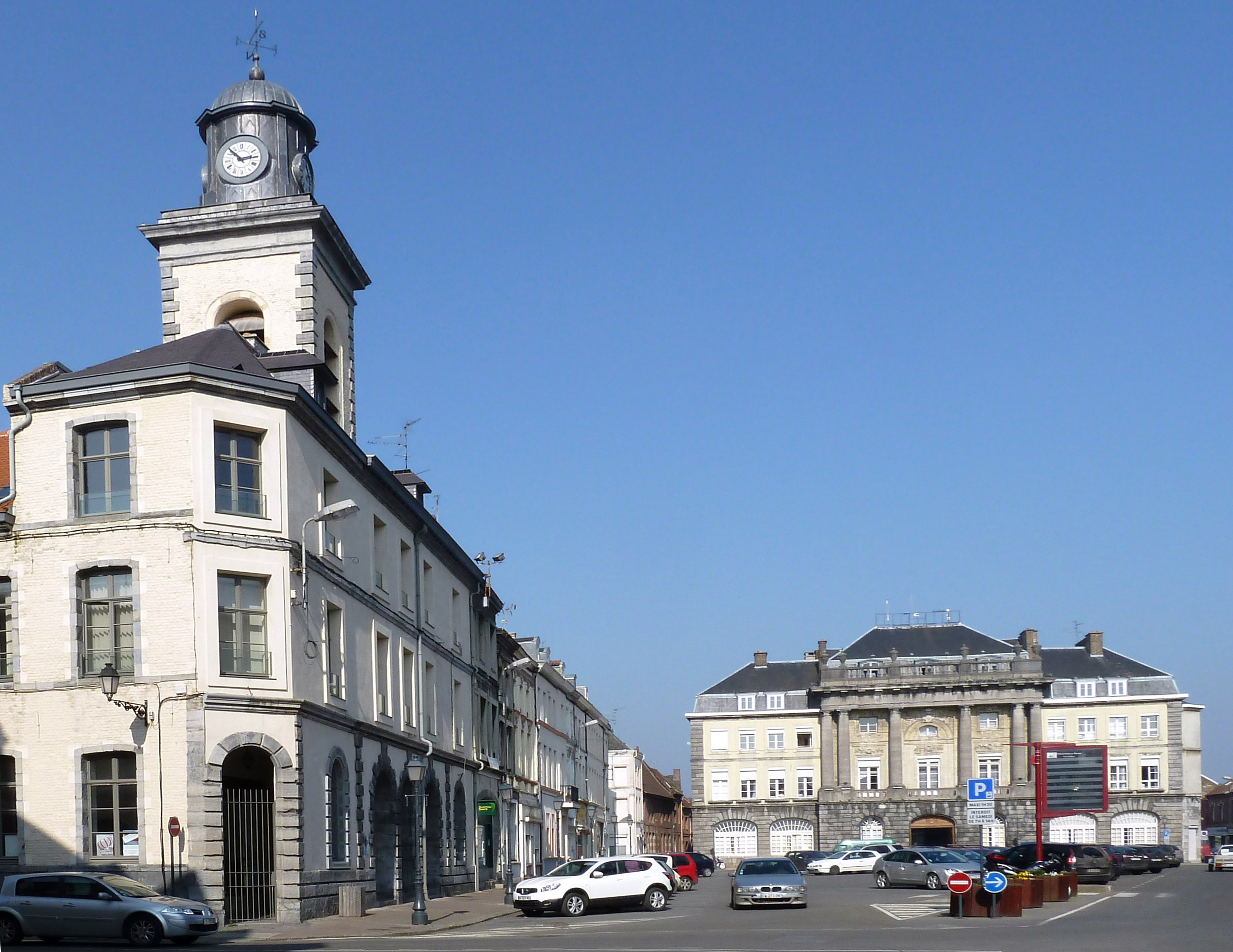 Beffroi de Condé-sur-l'Escaut .